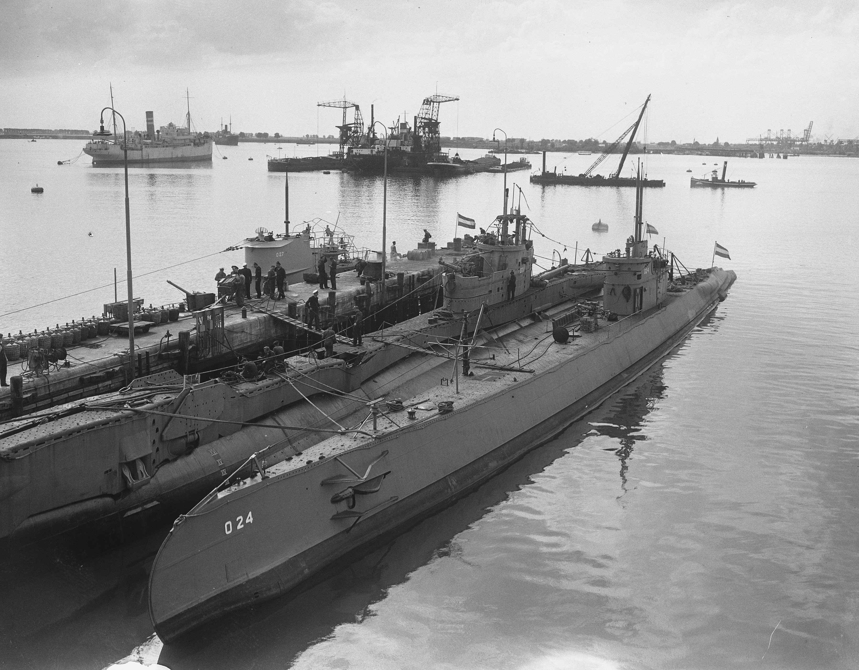 Collectie / Archief : Fotocollectie Anefo Reportage / Serie : [ onbekend ] Beschrijving : Onderzeedienst Waalhaven voor Marvo Datum : 1 juni 1949 Locatie : Waalhaven Trefwoorden : ONDERZEEDIENSTEN Fotograaf : Merk, Ben / Anefo Auteursrechthebbende : Nationaal Archief Materiaalsoort : Glasnegatief Nummer archiefinventaris : bekijk toegang 2.24.01.09 Bestanddeelnummer : 903-4117